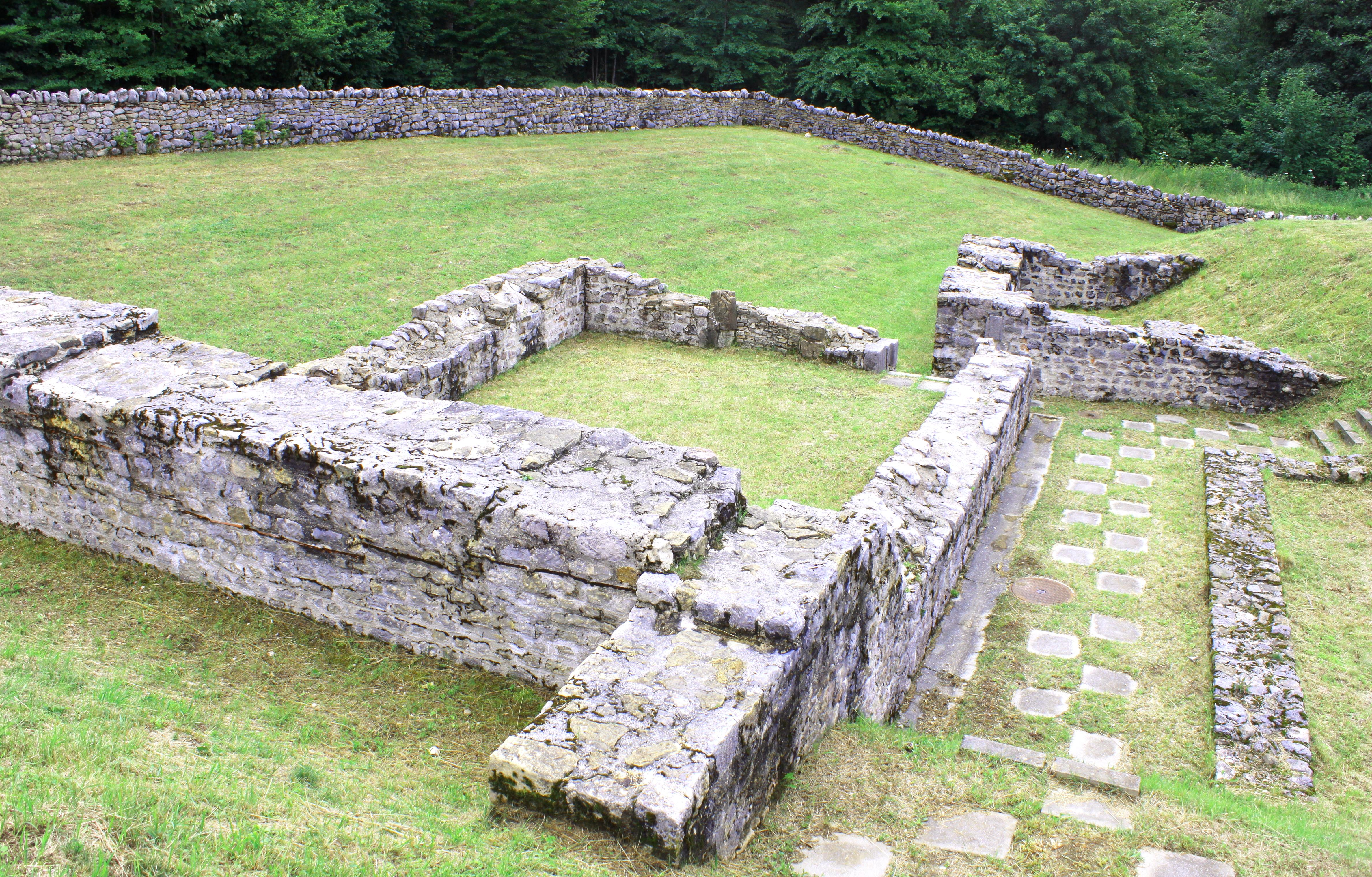 Suisse, canton de Vaud, Arzier, Chartreuse d'Oujon et maison basse attenante (monastère médiéval) : vue des anciennes parties communes (ruines) du monastère